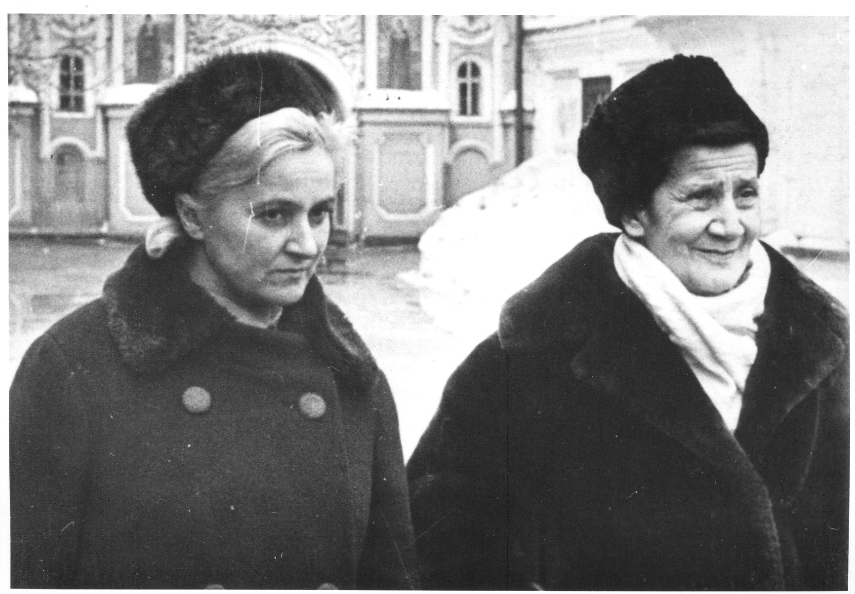 Мира Алечковић и Десанка Максимовић у Москви, СССР (1968). Уступио Срђа Николић, син Мире Алечковић.